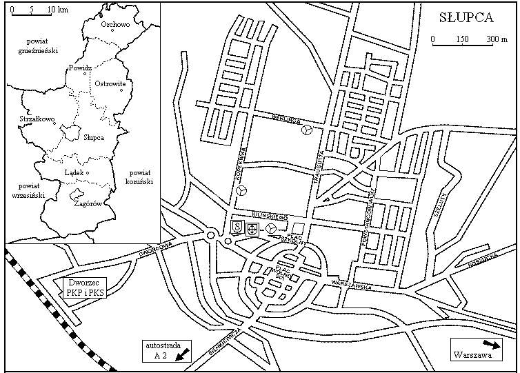 Ogólny zarys ulic Słupcy (autor: Marcin Majdecki)